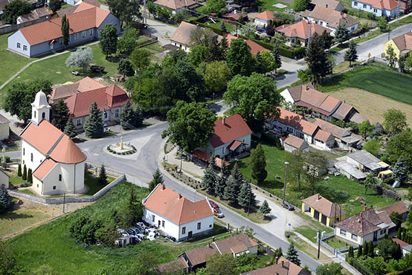 Légi fotó Vágról